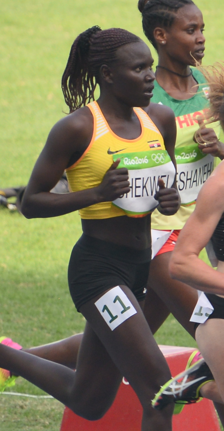 La 1er série du 5000m féminin à Rio 2016